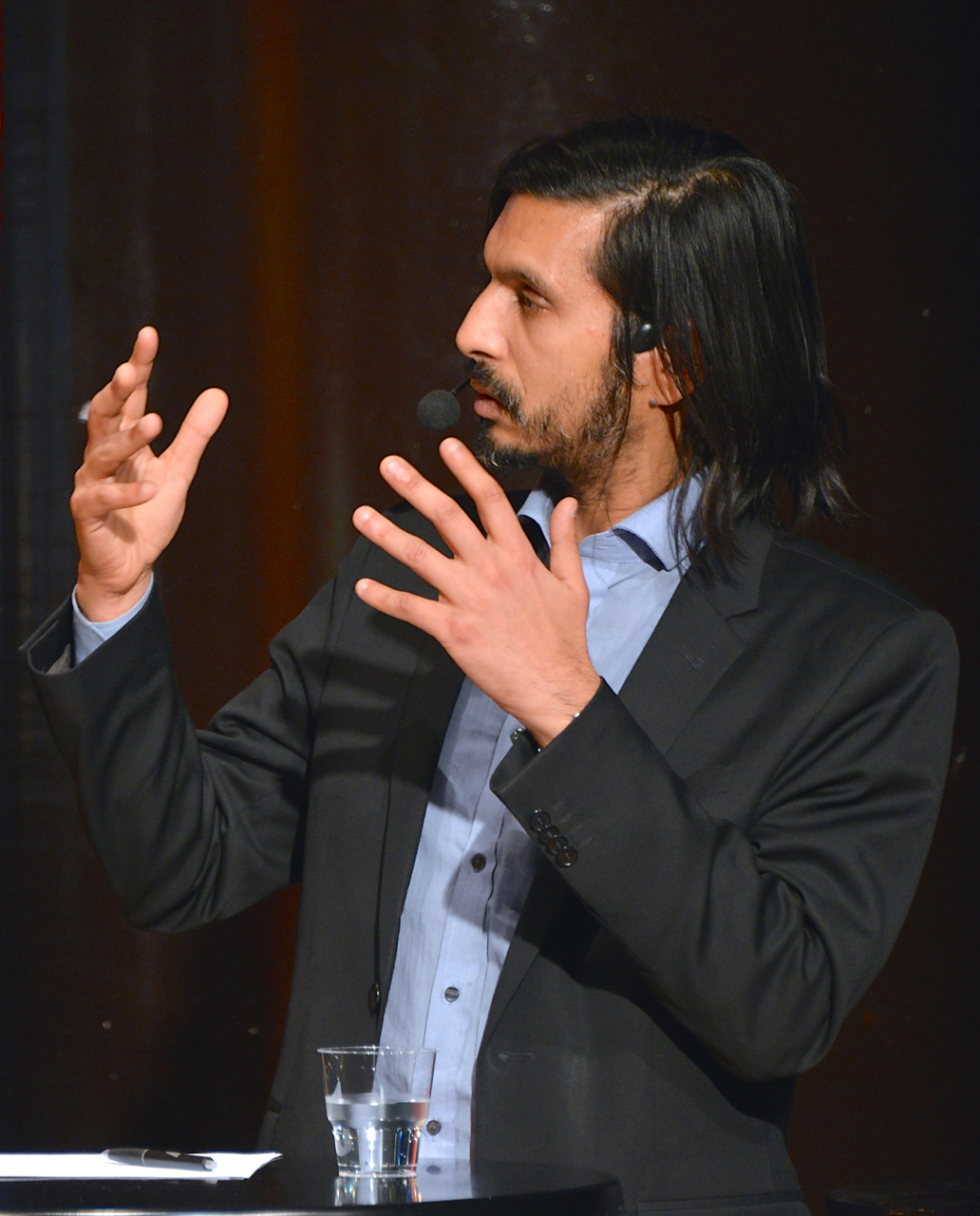 Kulturdebatt på Kulturhuset Stadsteatern den 24 mars 2014. Ska vi kvotera Hamlet? Om representation och innehåll på våra scener. Qaisar Mahmood – Författare och Kulturarvschef på Riksantikvarieämbetet.